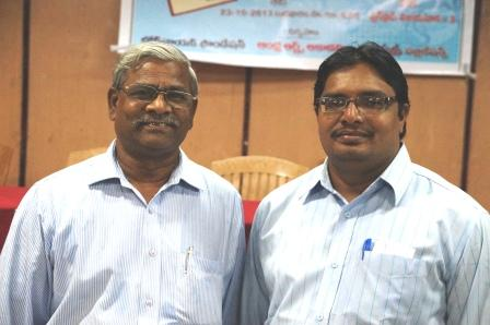 డా.గుమ్మా సాంబశివరావు మరియు కోలా శేఖర్